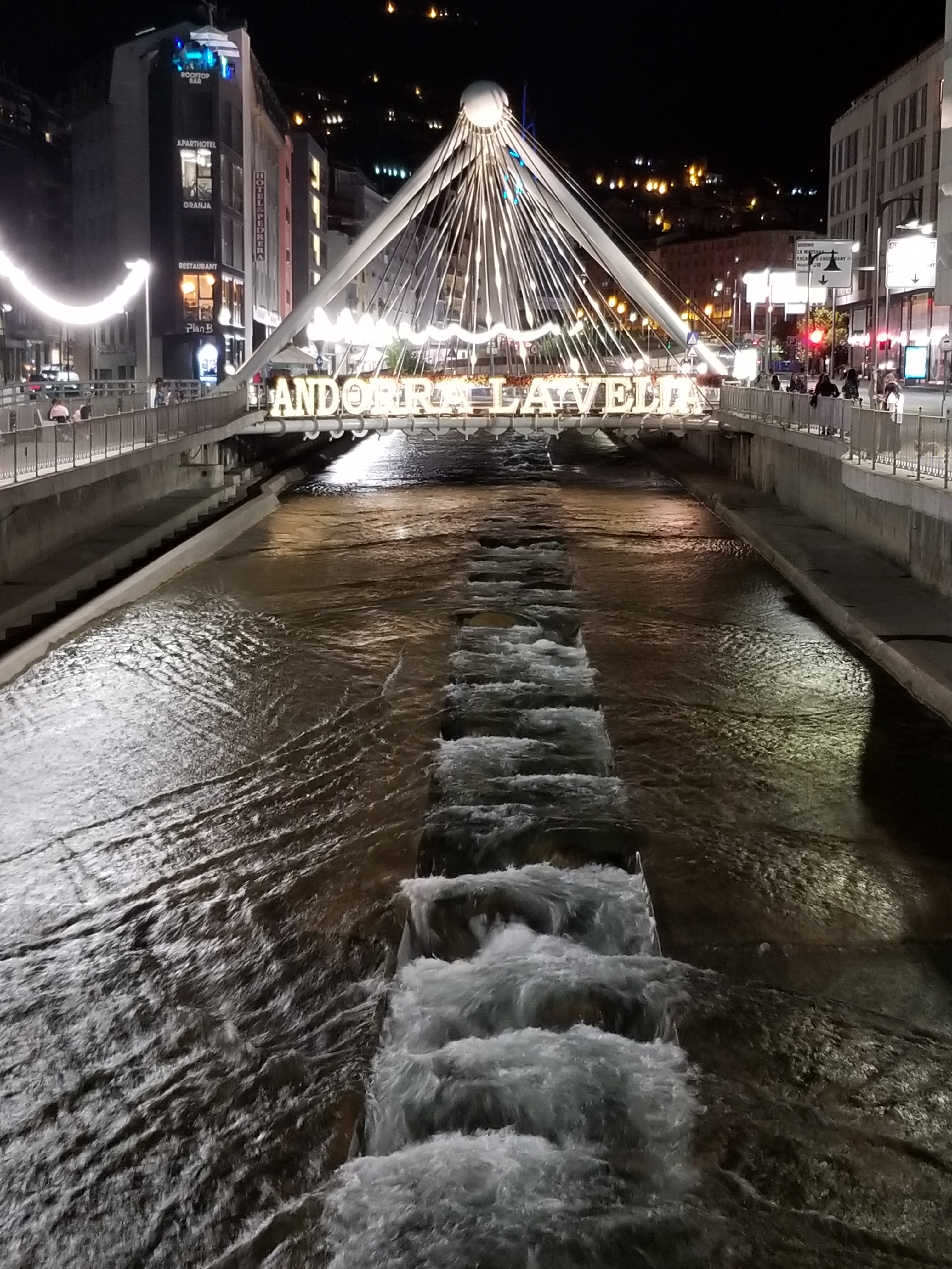 אנדורה לה-ולה